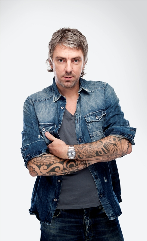 Rudolf Alexander (Ruud) de Wild (Hilversum, 24 april 1969[1]) is een Nederlandse radio-dj en kunstenaar.